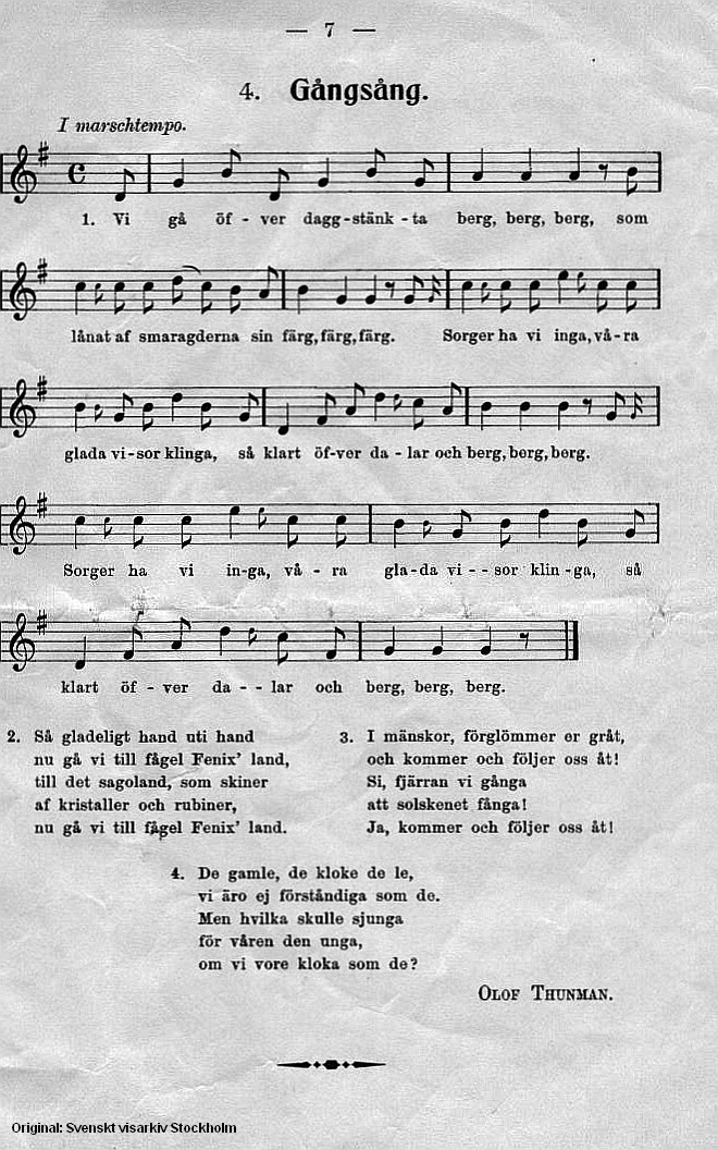 Gångsång (Vi gå över daggstänkta berg) 1908